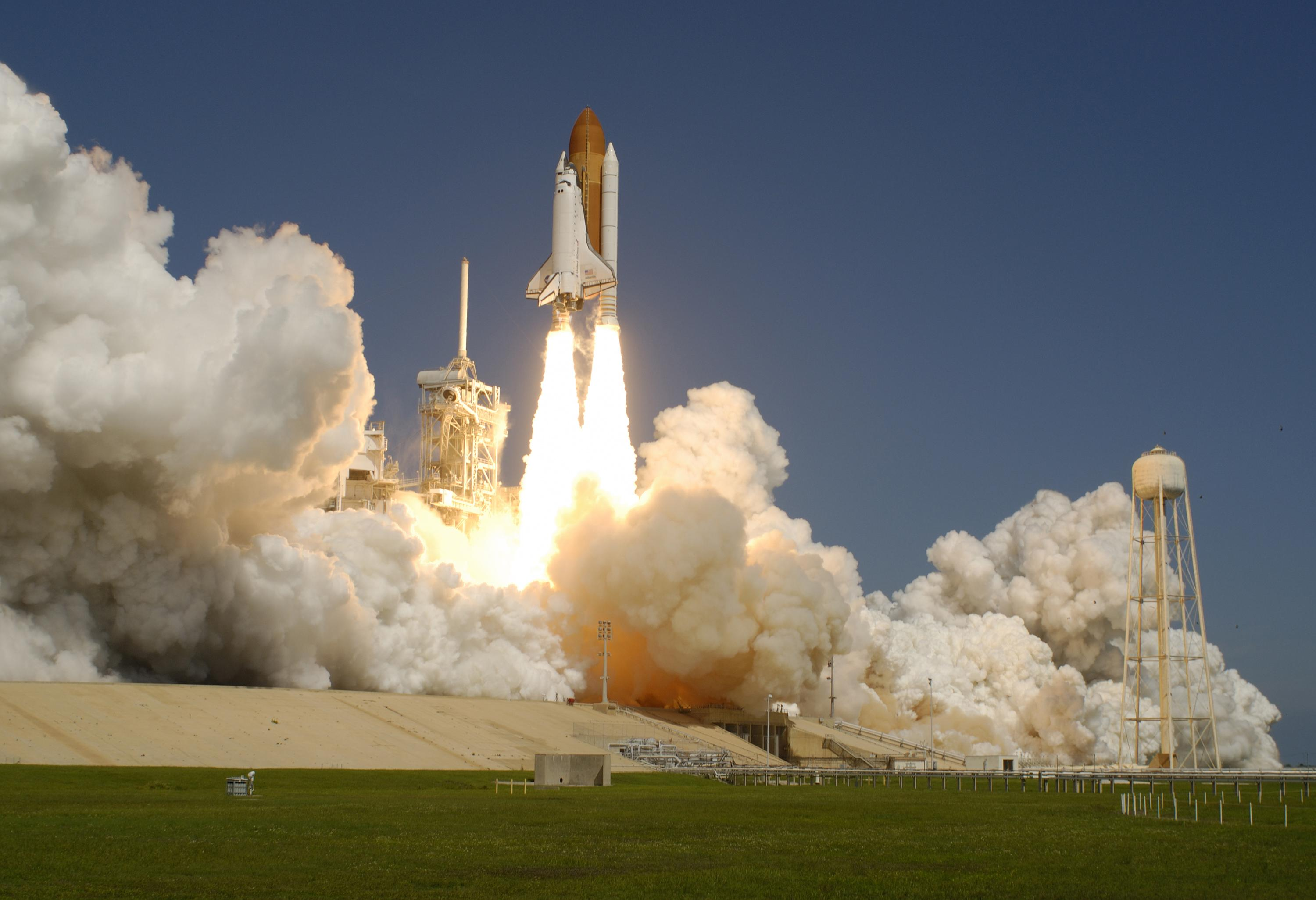 STS-115 launches